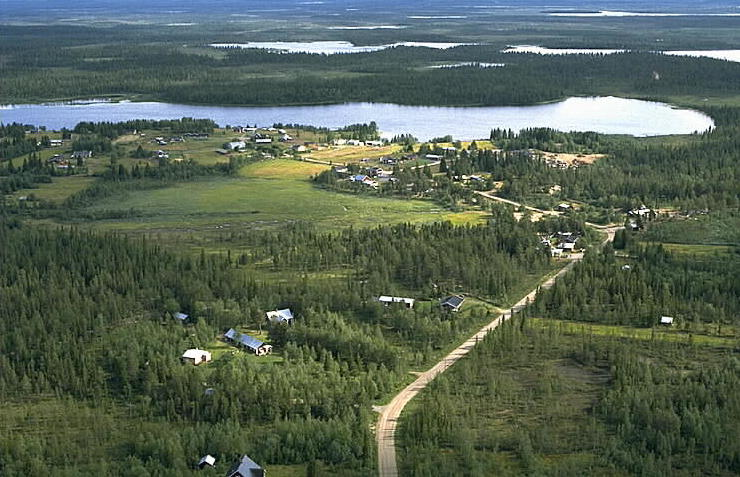 Motiv: Vivungi Nyckelord: Flygbilder, Riksintressen Kategori: JordbruksbyVivungi